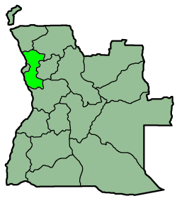 A map from province Bengo, Angola